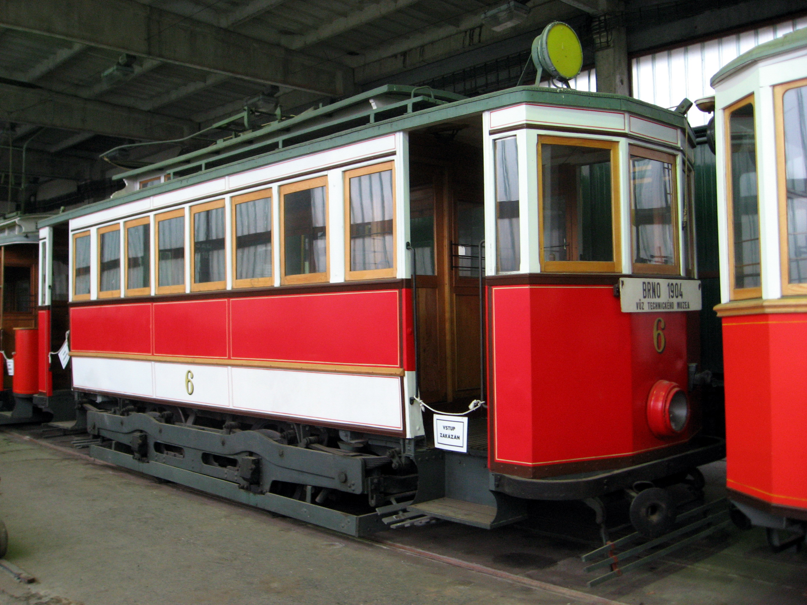 Brněnská tramvaj ev. č. 6, rok výroby 1904, výrobce Lederer & Porges (Královopolská) – exponát Technického muzea v Brně, depozitář MHD v Líšni